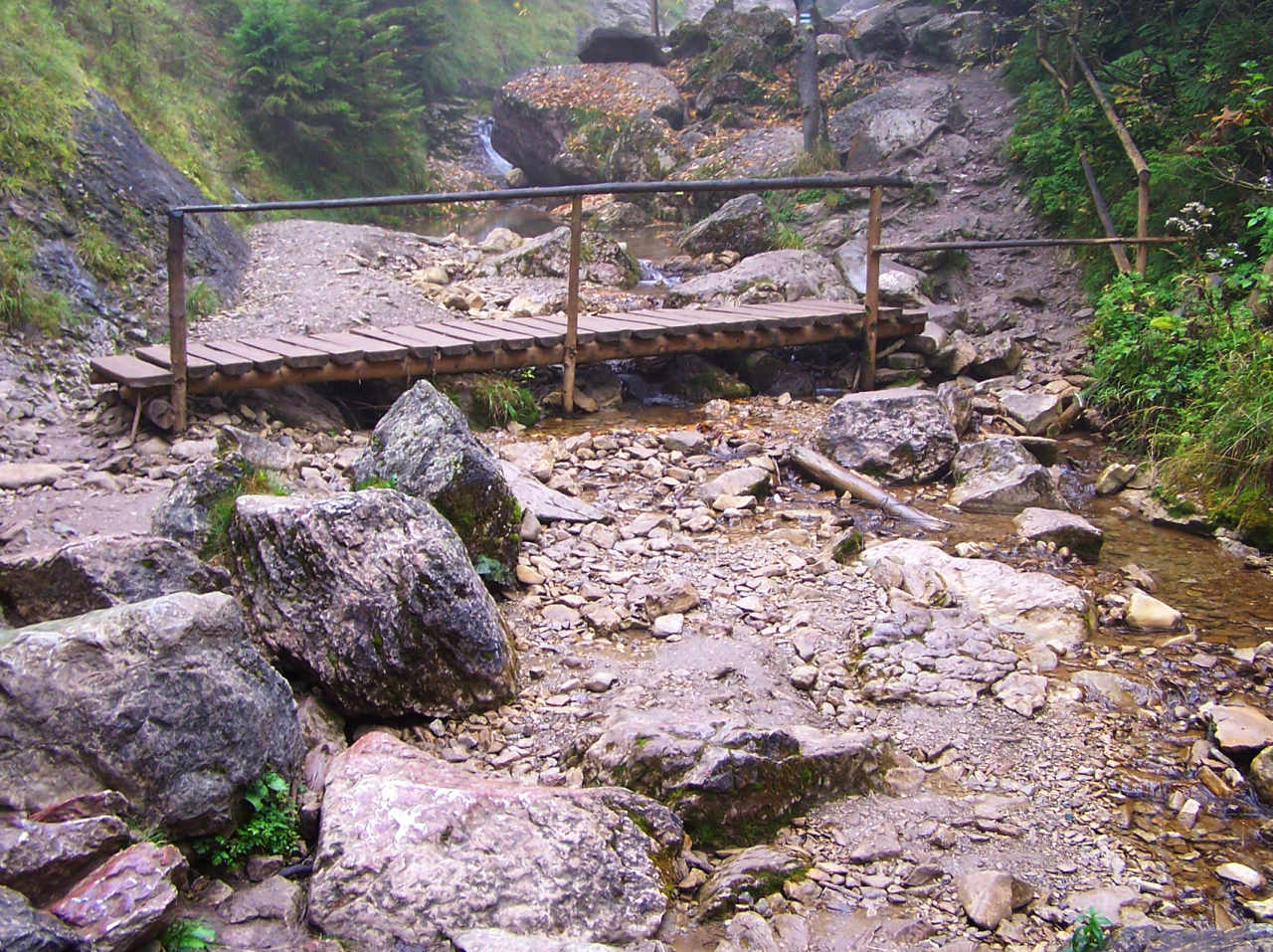 Wąwóz Homole (Pieniny)